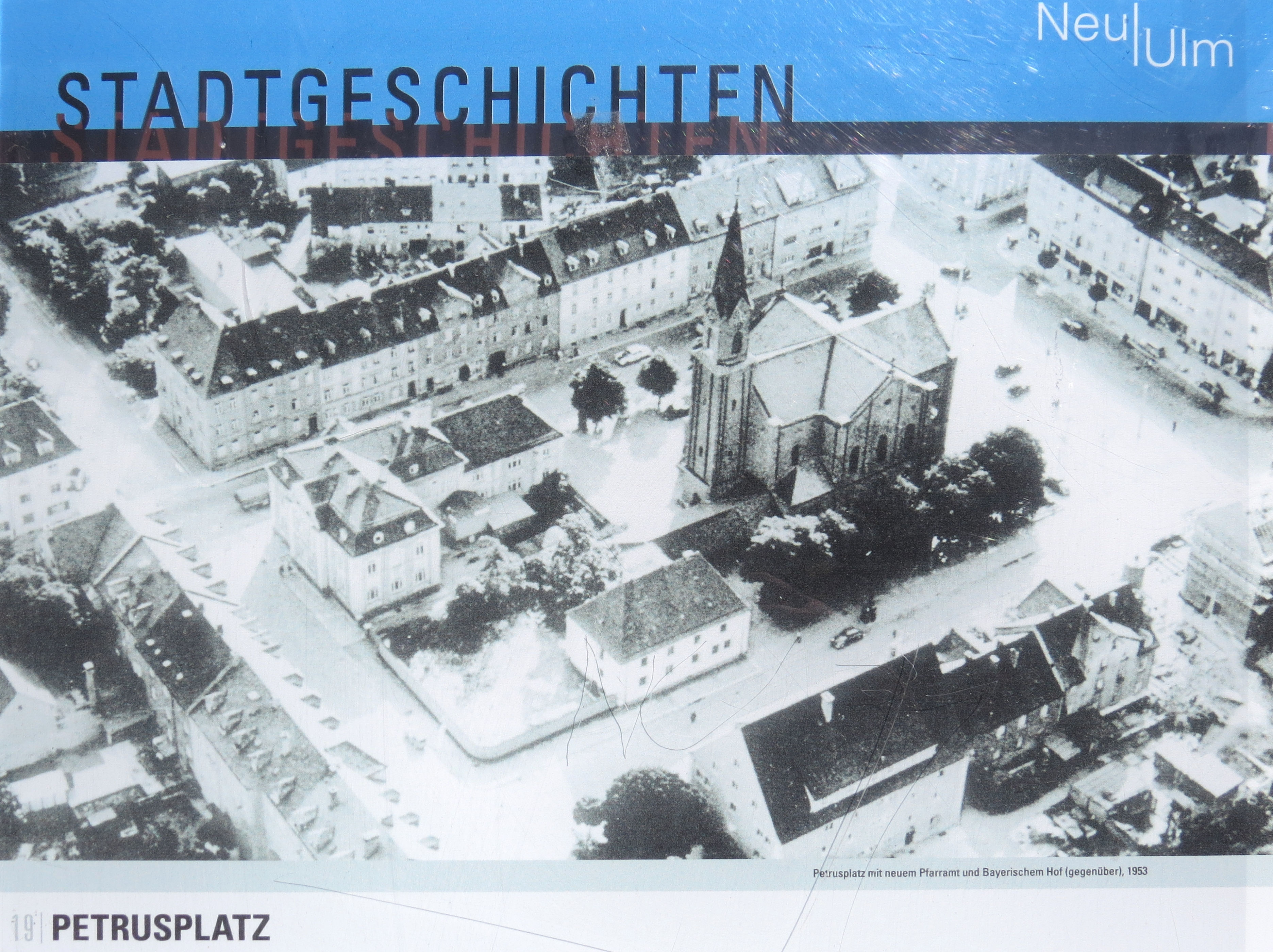 Petruskirche Neu-Ulm, Infotafel, 1953